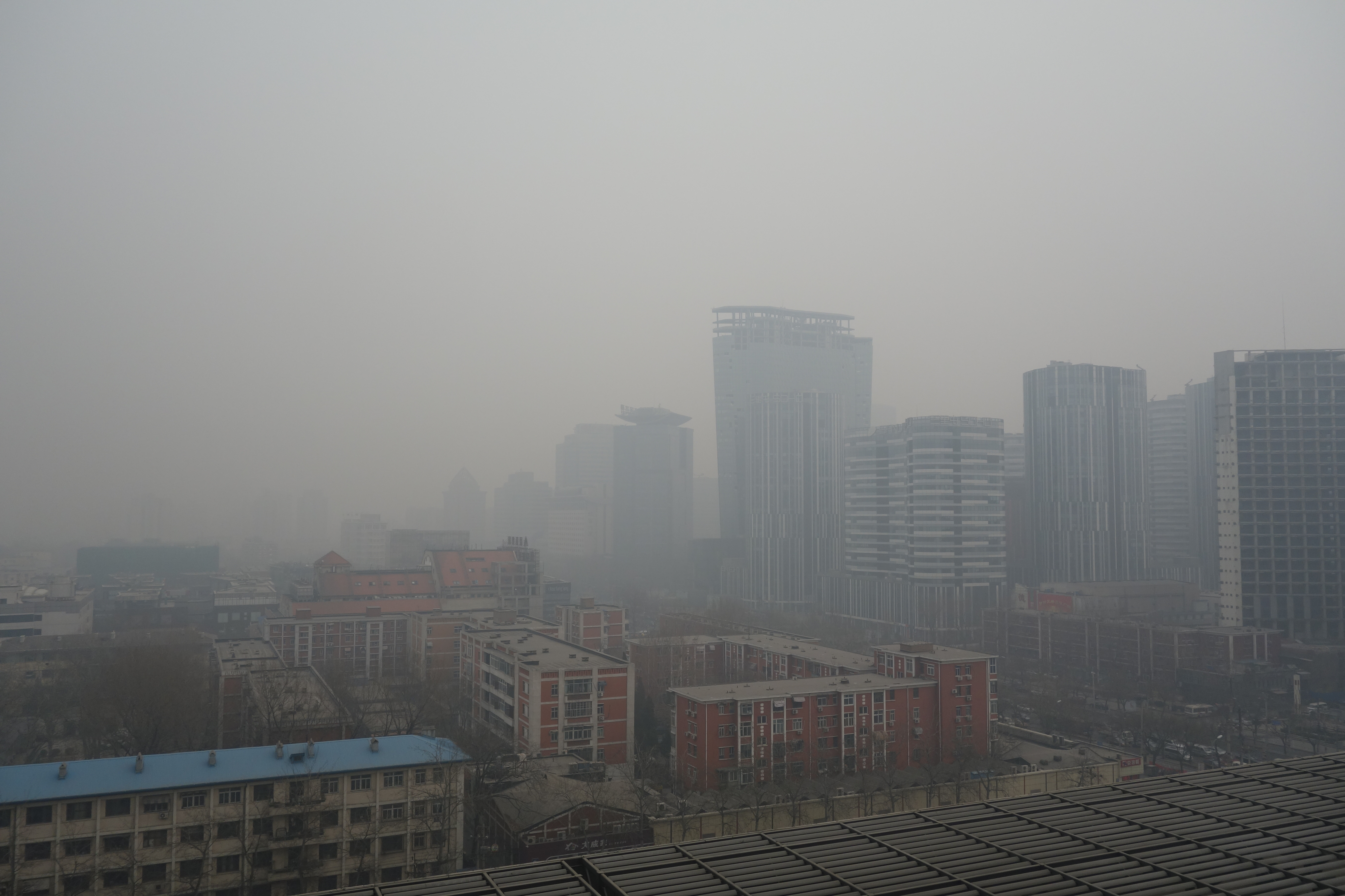 Sanlitun , Beijing, China